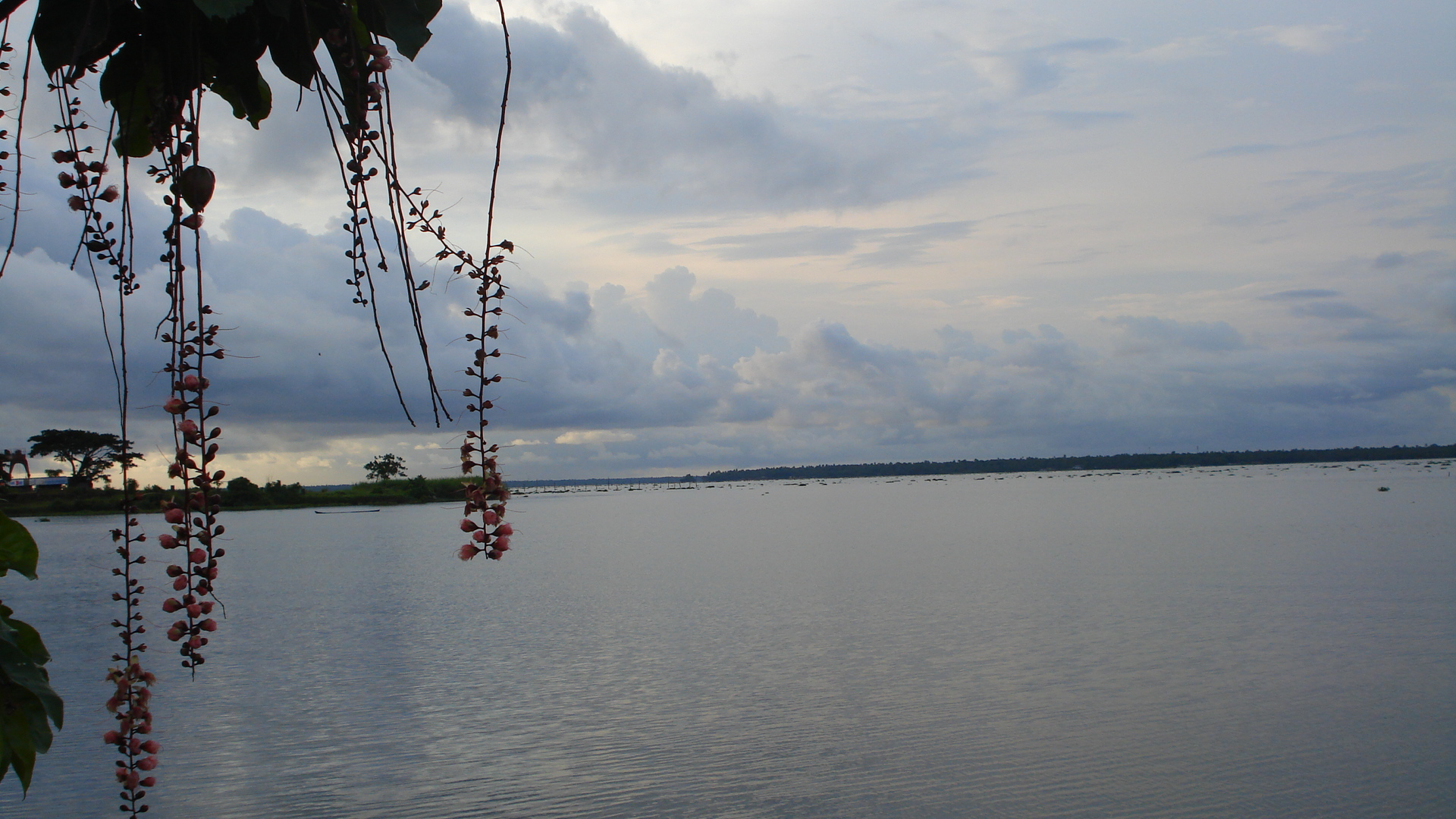 തണ്ണീർമുക്കത്തെ ഒരു കാഴ്ച